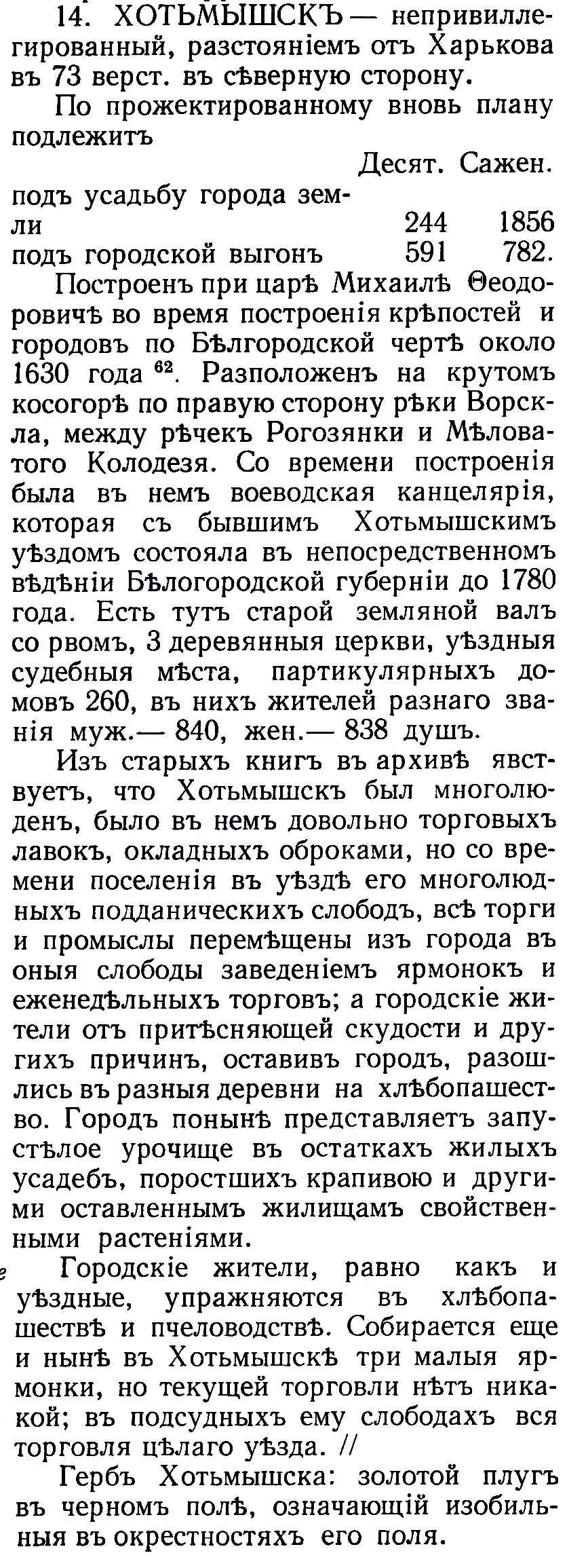 В "Топографическом описании Харьковского наместничества" 1788 года; 14-й (из 15-ти) город - уездный Хотмыжск - в разделе "О городах" (из 15-ти).